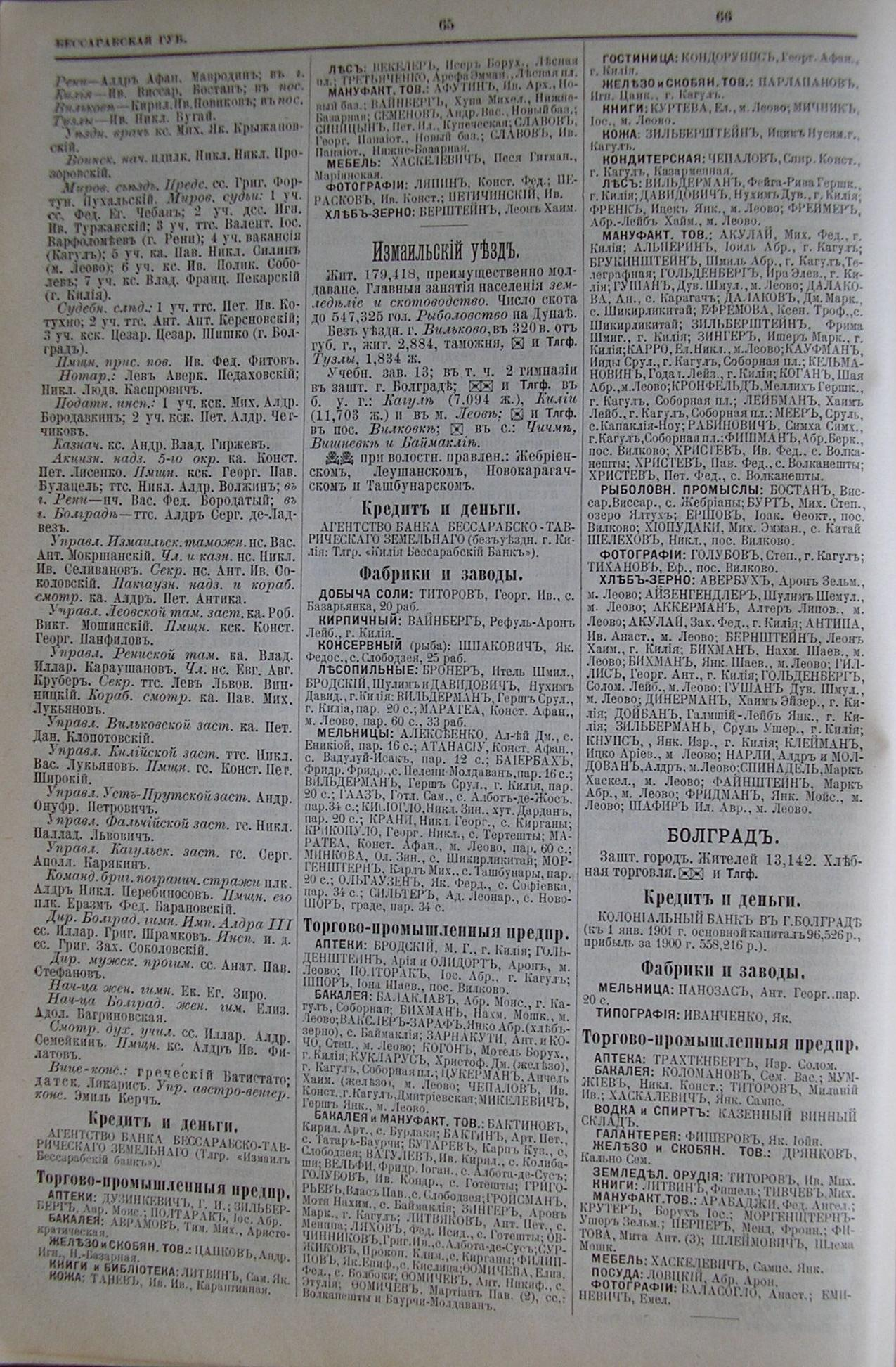 Стр. 64-66 (Измаил, Измаильский уезд, Болград) из адрес-календаря Российской империи "Вся Россия", 1902.